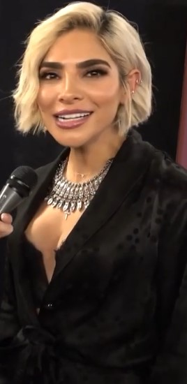 Alejandra Espinoza en entrevista en 2020